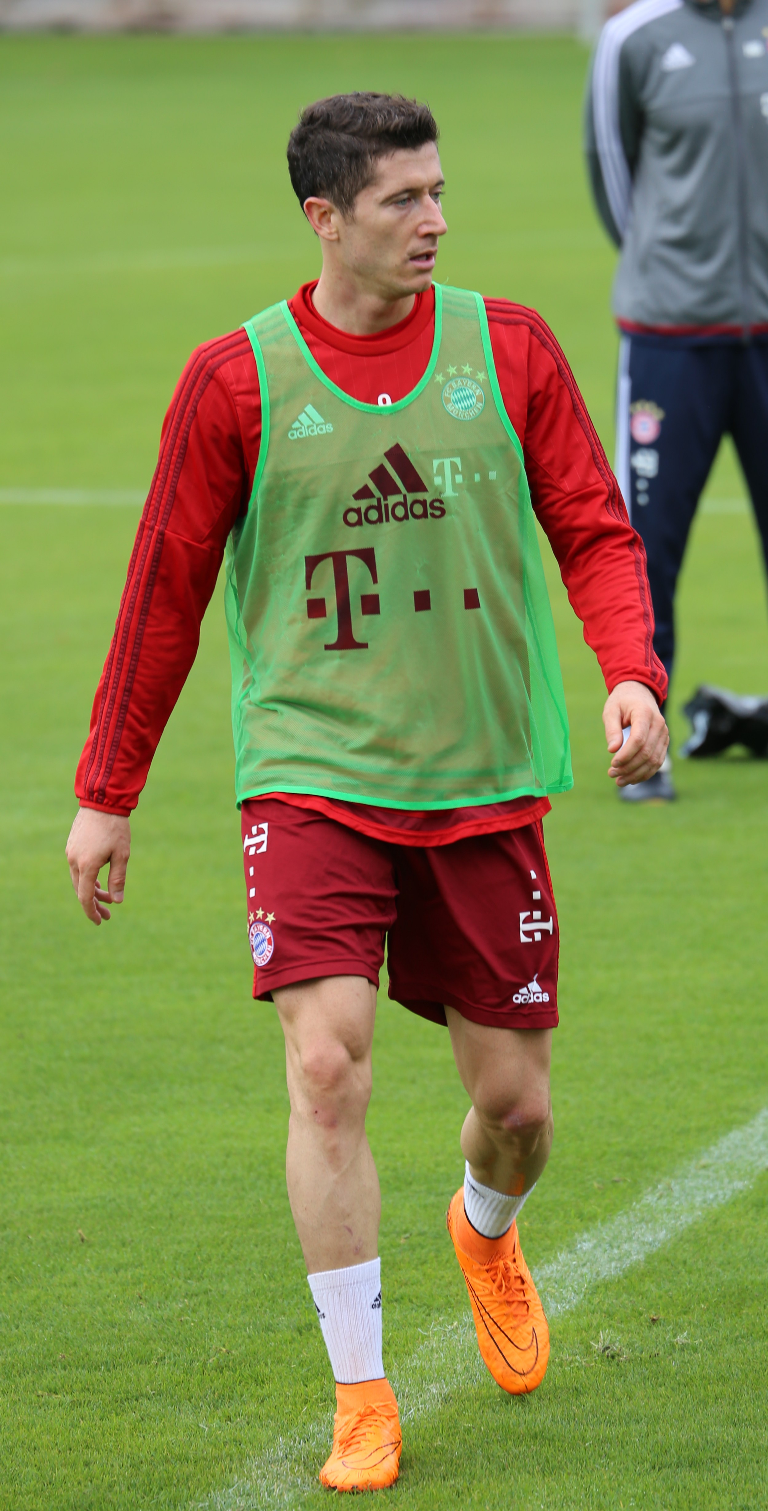 Robert Lewandowski beim Training auf dem Gelände des FC Bayern München